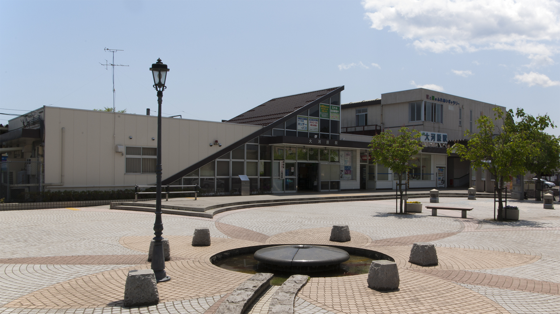 東日本旅客鉄道株式会社東北本線大河原駅